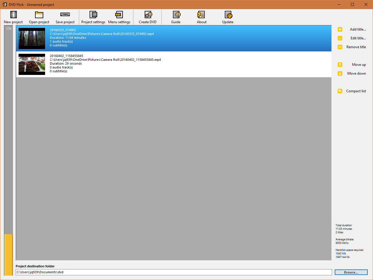 DVD Flick in Windows 10